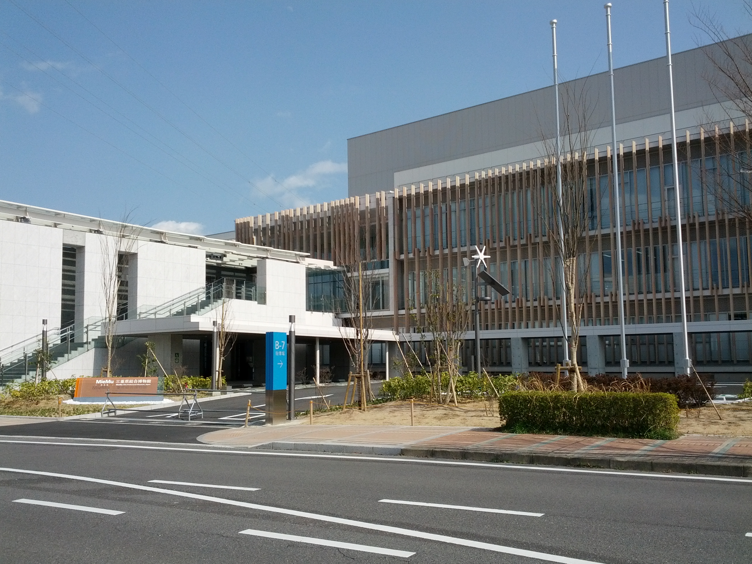 三重県総合博物館(三重県総合文化センター側歩道から撮影)